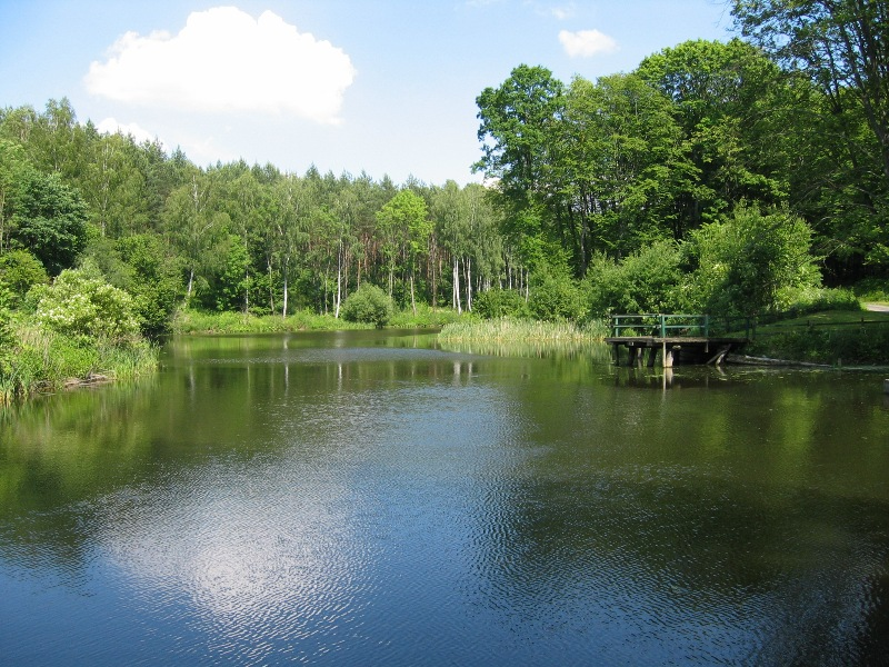 Młynisko - rzeka Liwa na wysokości Starego Młyna Zdjęcie wykonano 23 czerwca 2004 roku.